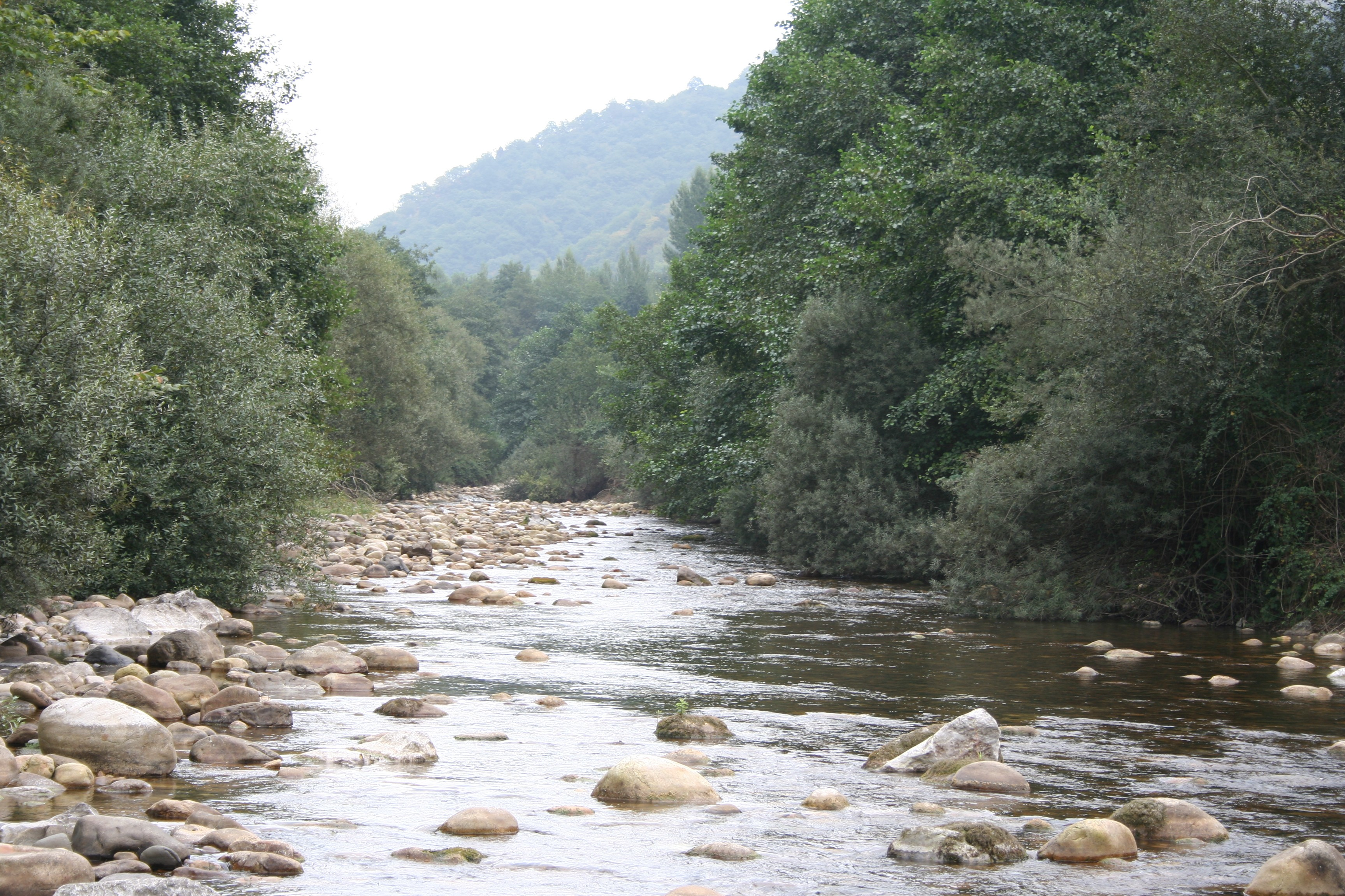 El río Aller a su paso por Corigos